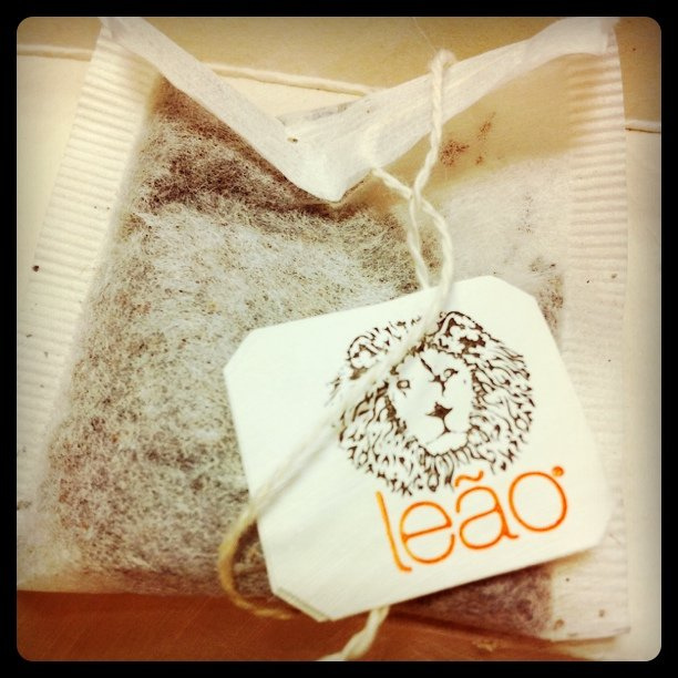 Leão Matte 4.0 grams